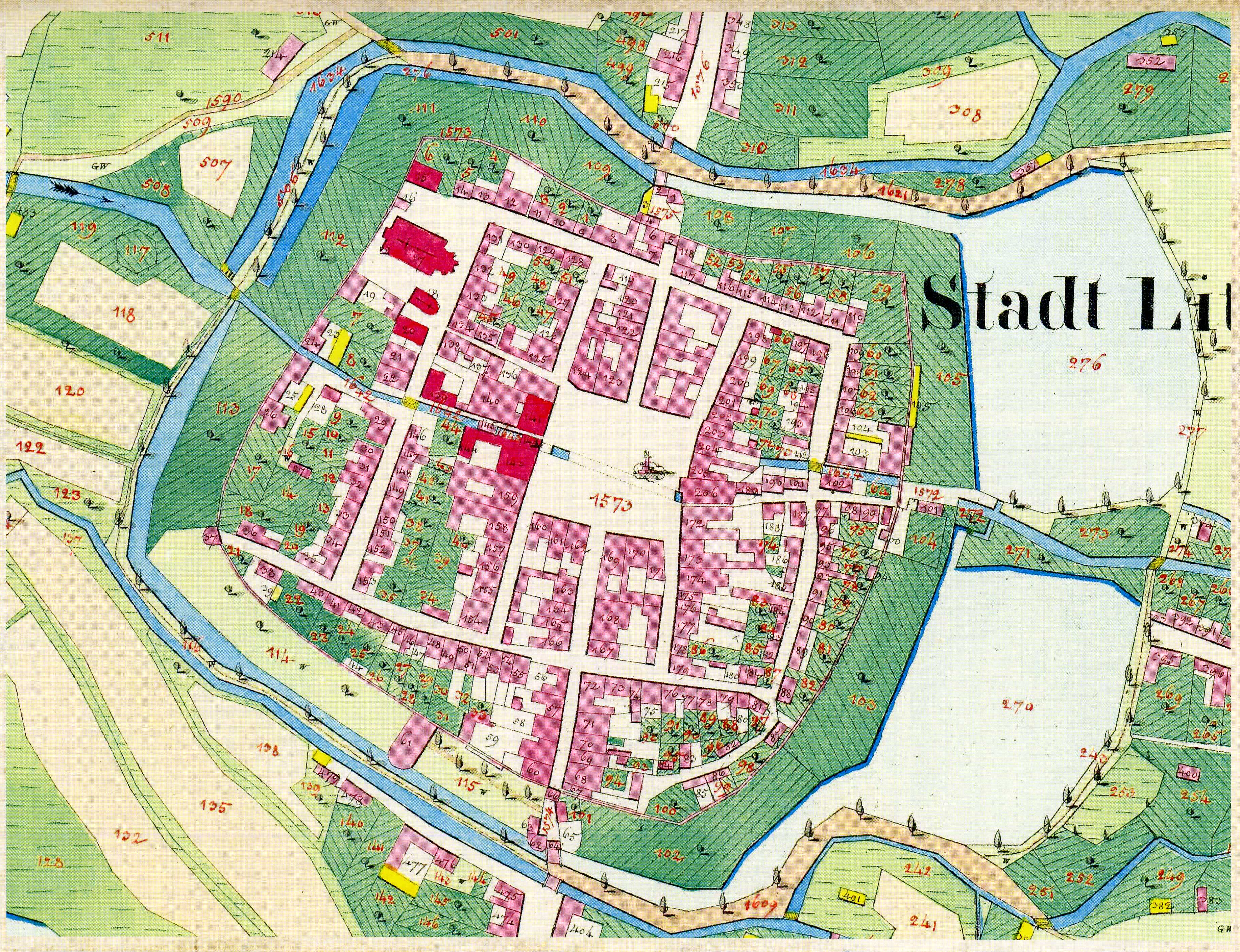 Litovel, císařský otisk stabilního katastru This file was uploaded during the project of WikiTown Litovel.